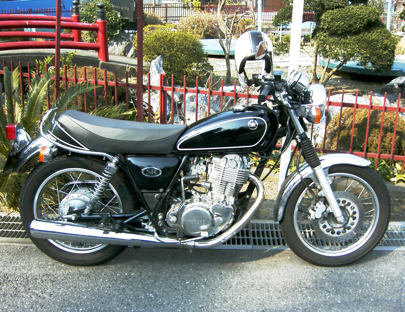 YAMAHA_SR400 Japan